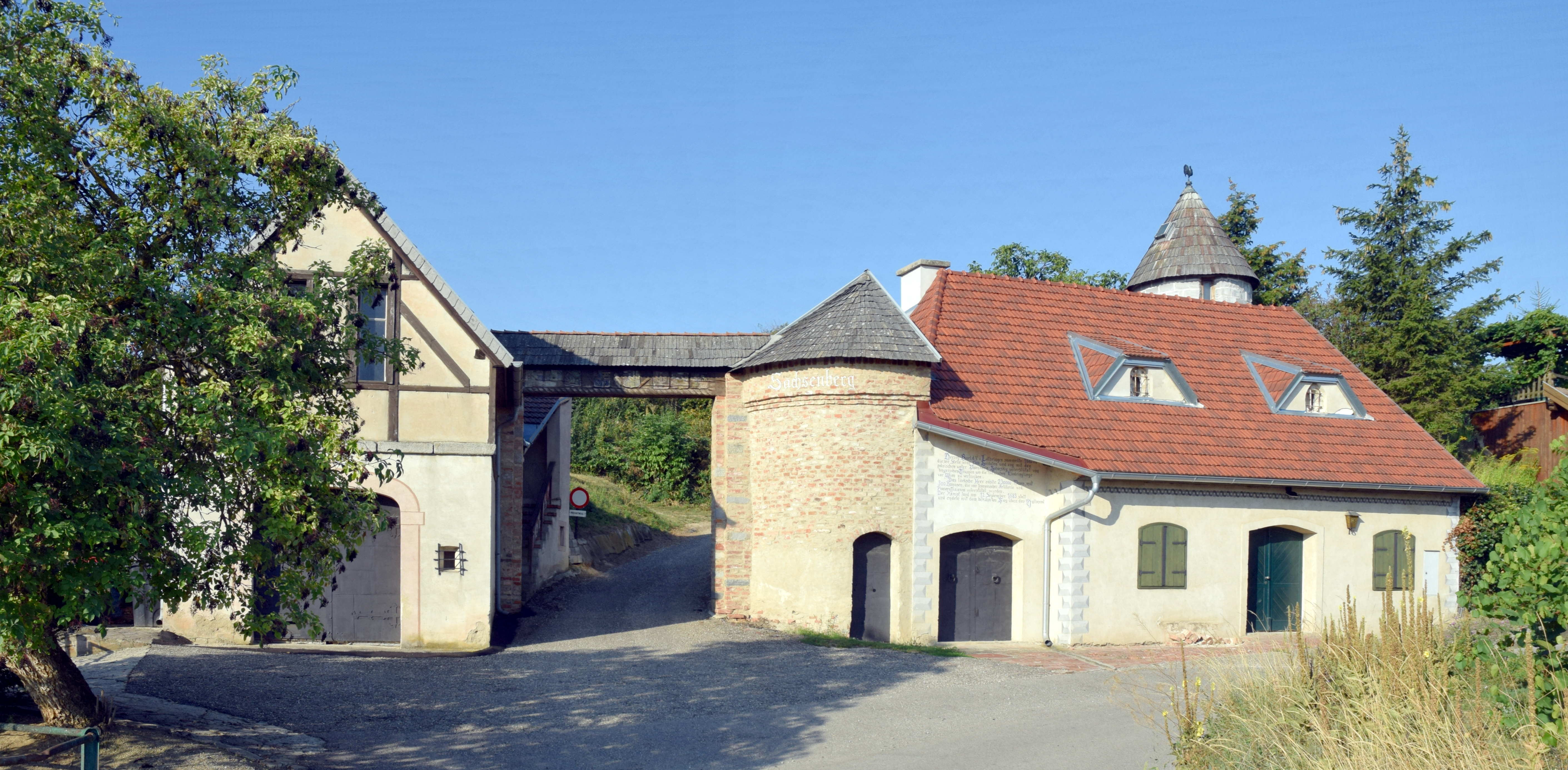 Gedenkstätte an die beginnende Befreiung Wiens während der Türkenbelagerung 1683